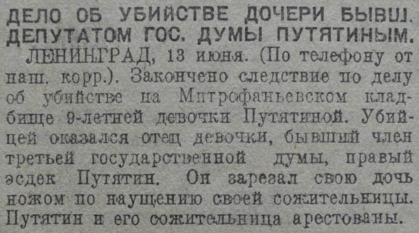 Газетная вырезка с обвинением В. Путятина в убийстве 9-летней дочери (Василий Петрович Путятин (1857 — после 1925) — чертёжник, член РСДРП(м), депутат Государственной думы III созыва от Вятской губернииот Вятской губернии)